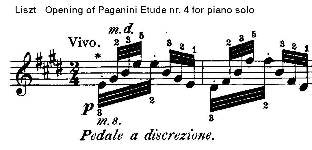 Liszt opening bars etude 4 paganini